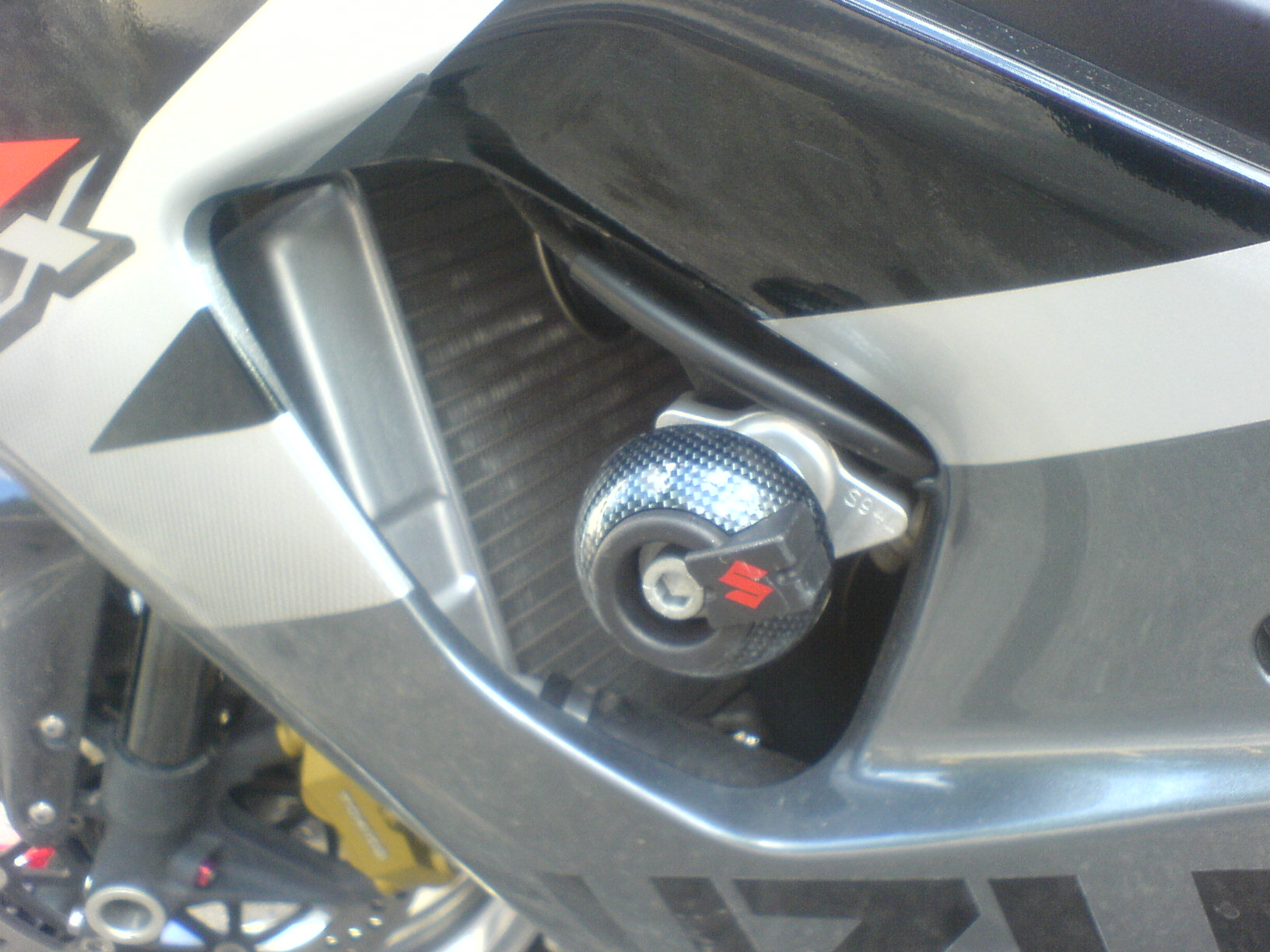 Motorrad-Sturzpad von Suzuki (Sonderzubehör) - hier die linke Seite eines Supersportlers